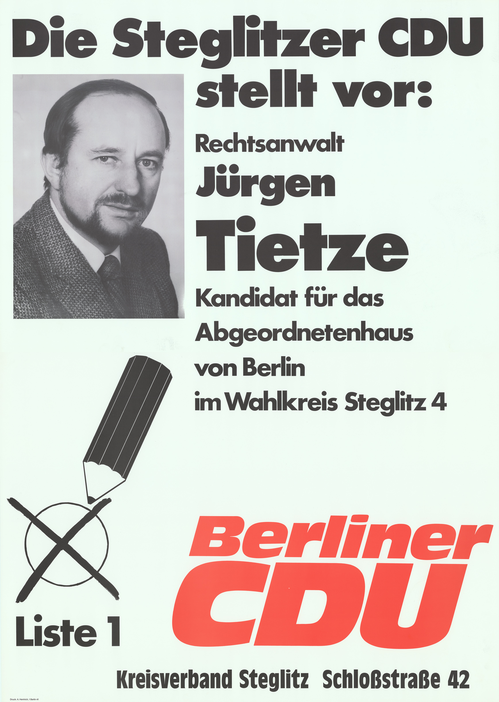 Die Steglitzer CDU stellt vor: Rechtsanwalt Jürgen Tietze Kandidat für das Abgeordnetenhaus von Berlin ... Liste 1 Berliner CDU Kreisverband Steglitz ... Abbildung: Porträtfoto - Bleistift mit Stimmkreuz Kommentar: Zweiteiliges Plakat Plakatart: Kandidaten-/Personenplakat mit Porträt Auftraggeber: KV Steglitz Drucker_Druckart_Druckort: A. Hentrich, Berlin-Steglitz Objekt-Signatur: 10-004 : 540 Bestand: Plakate zu Abgeordnetenhauswahlen Berlin (10-004) GliederungBestand10-18: Plakate zu Abgeordnetenhauswahlen Berlin (10-004) » CDU Lizenz: KAS/ACDP 10-004 : 540 CC-BY-SA 3.0 DE